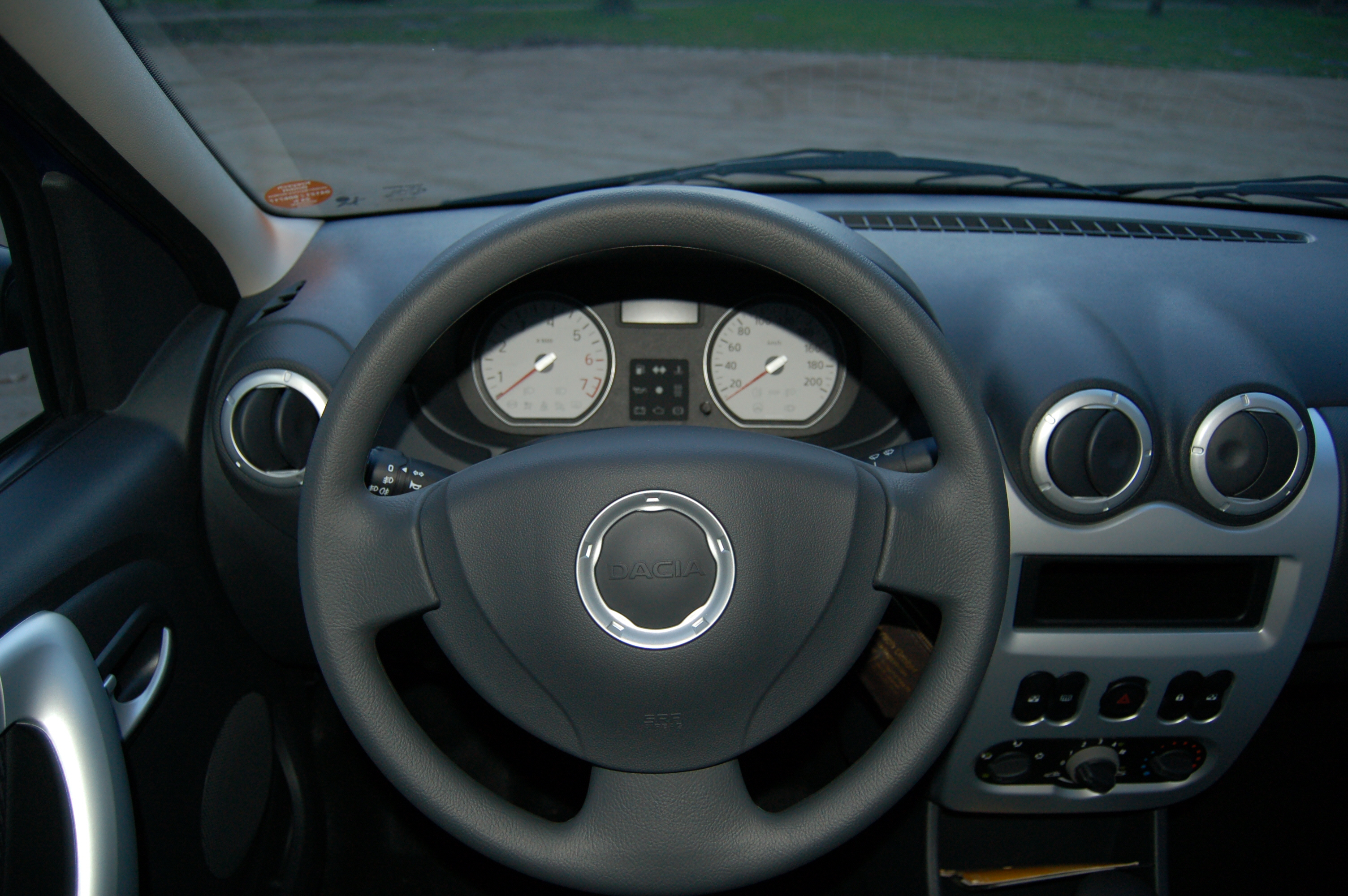 Das Armaturenbrett des Dacia Logan MCV Lauréate Modell 2009, baugleich mit dem Armaturenbrett des Dacia Sandero Lauréate.